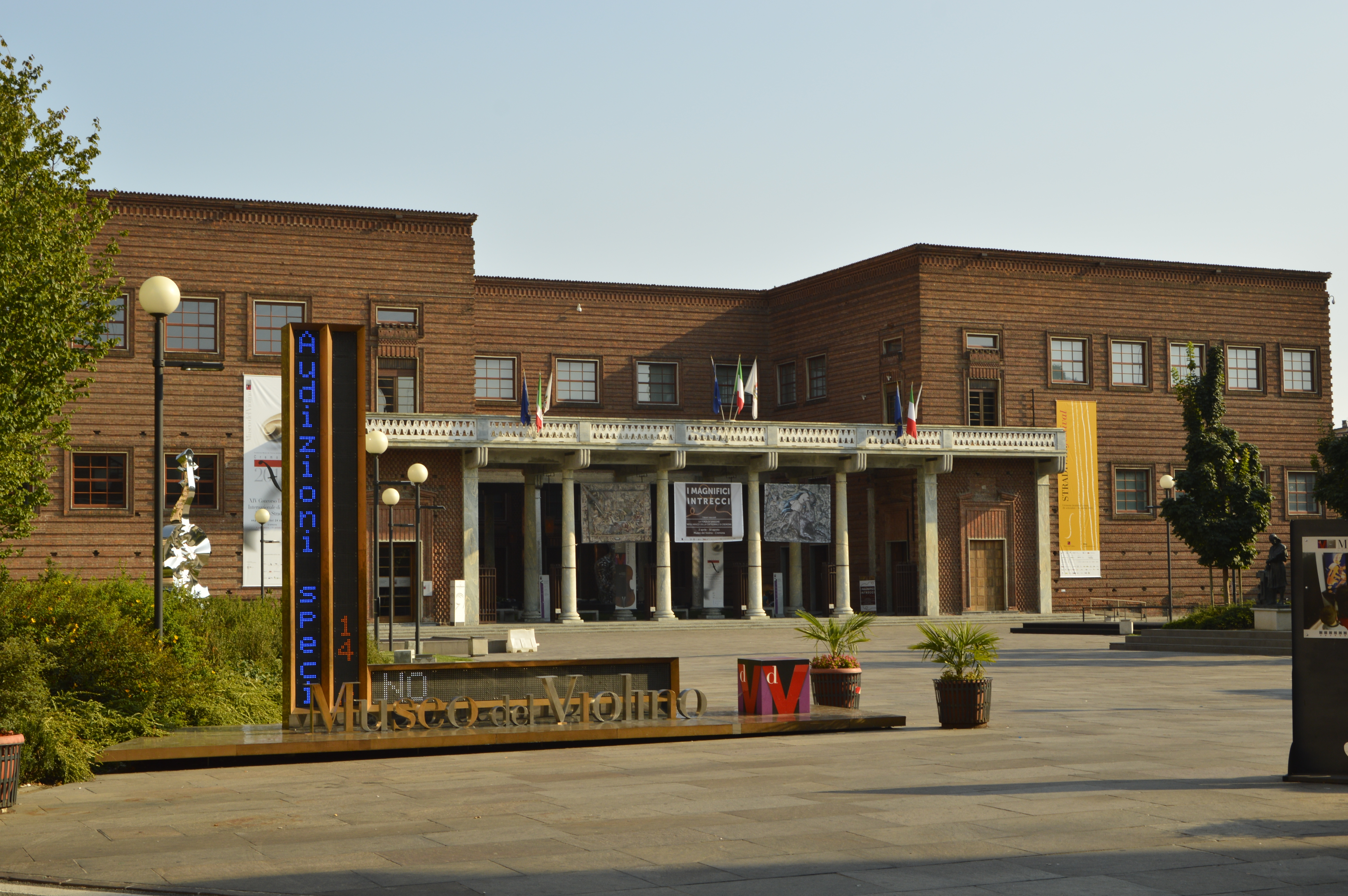 Palazzo dell'Arte, sede del Museo del Violino.